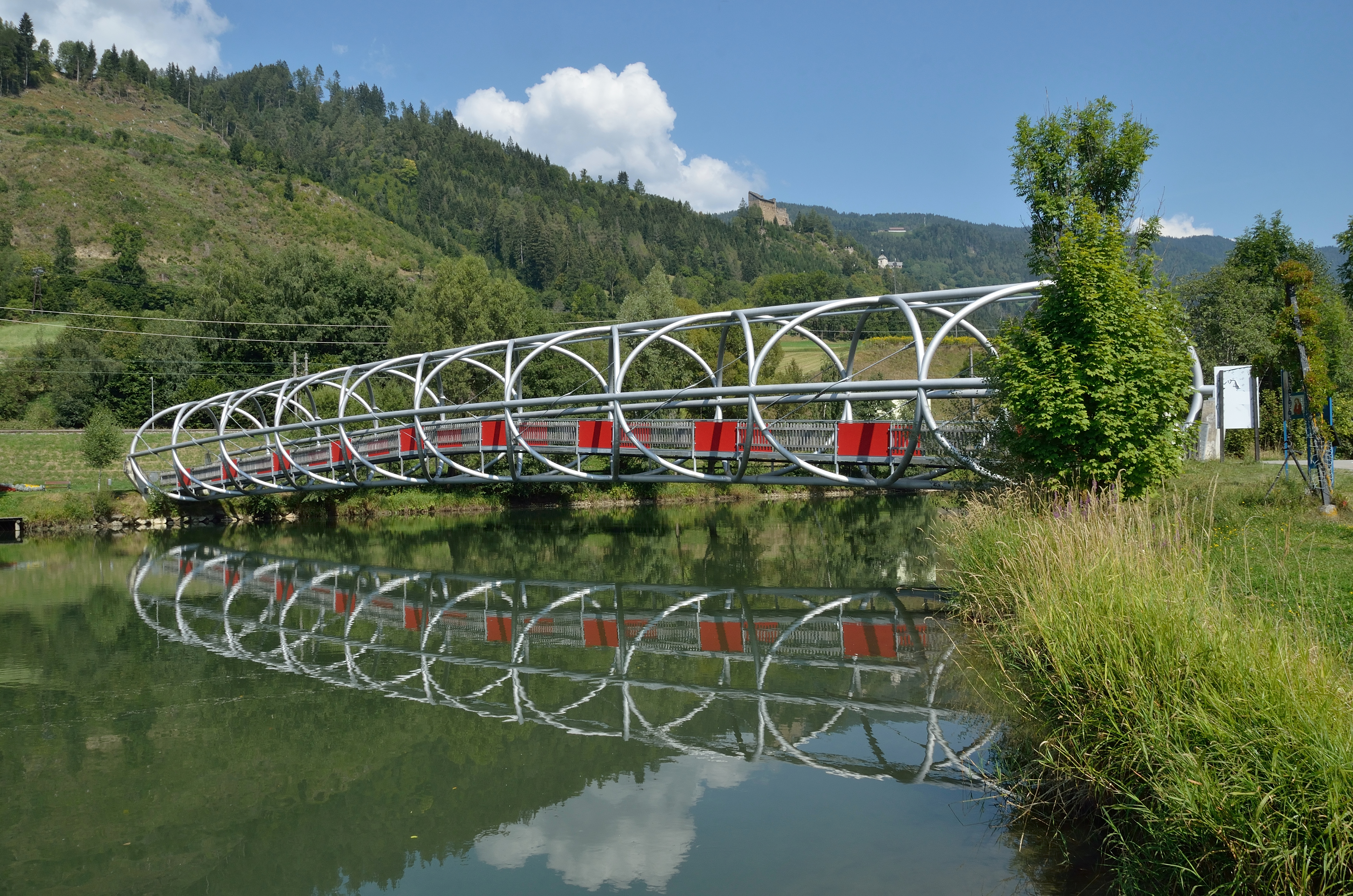 Die Fuß- und Radwegbrücke wurde 2004 unter Bürgermeister Eberhard Wallner errichtet. Sie überquert die Mur in Unzmarkt. Über sie führt der Murradweg.